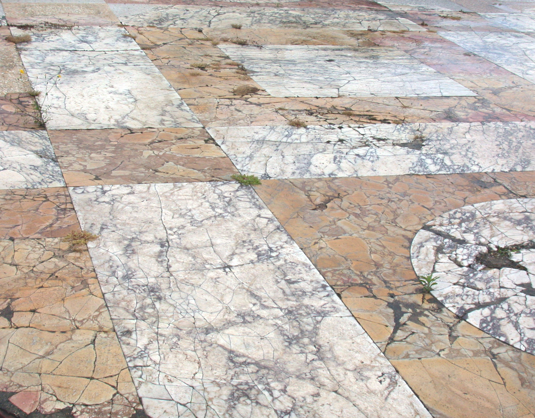 Roma, Foro di Traiano, pavimento originale dell'esedra orientale con disegno di cerchi e quadrati in pietre giallo antico e marmo pavonazzetto (106-112 d.C.)